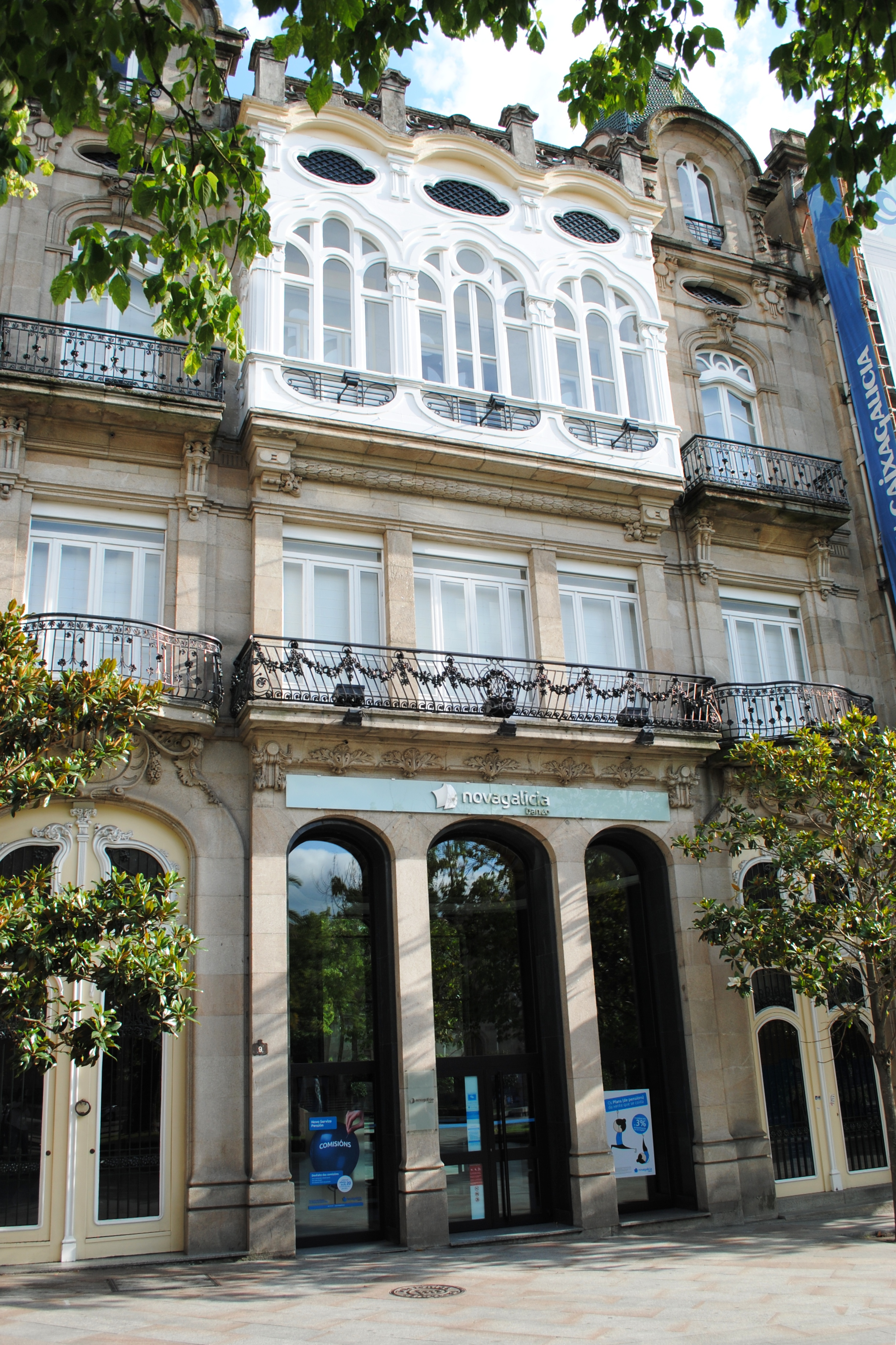 see title